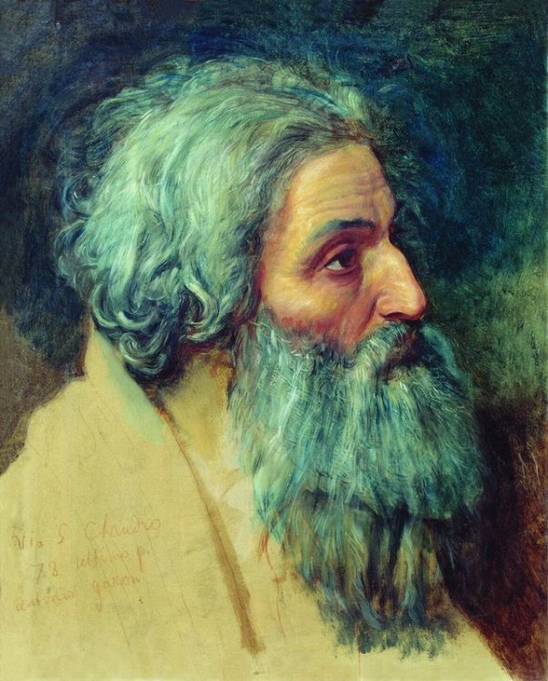 Голова апостола Андрея